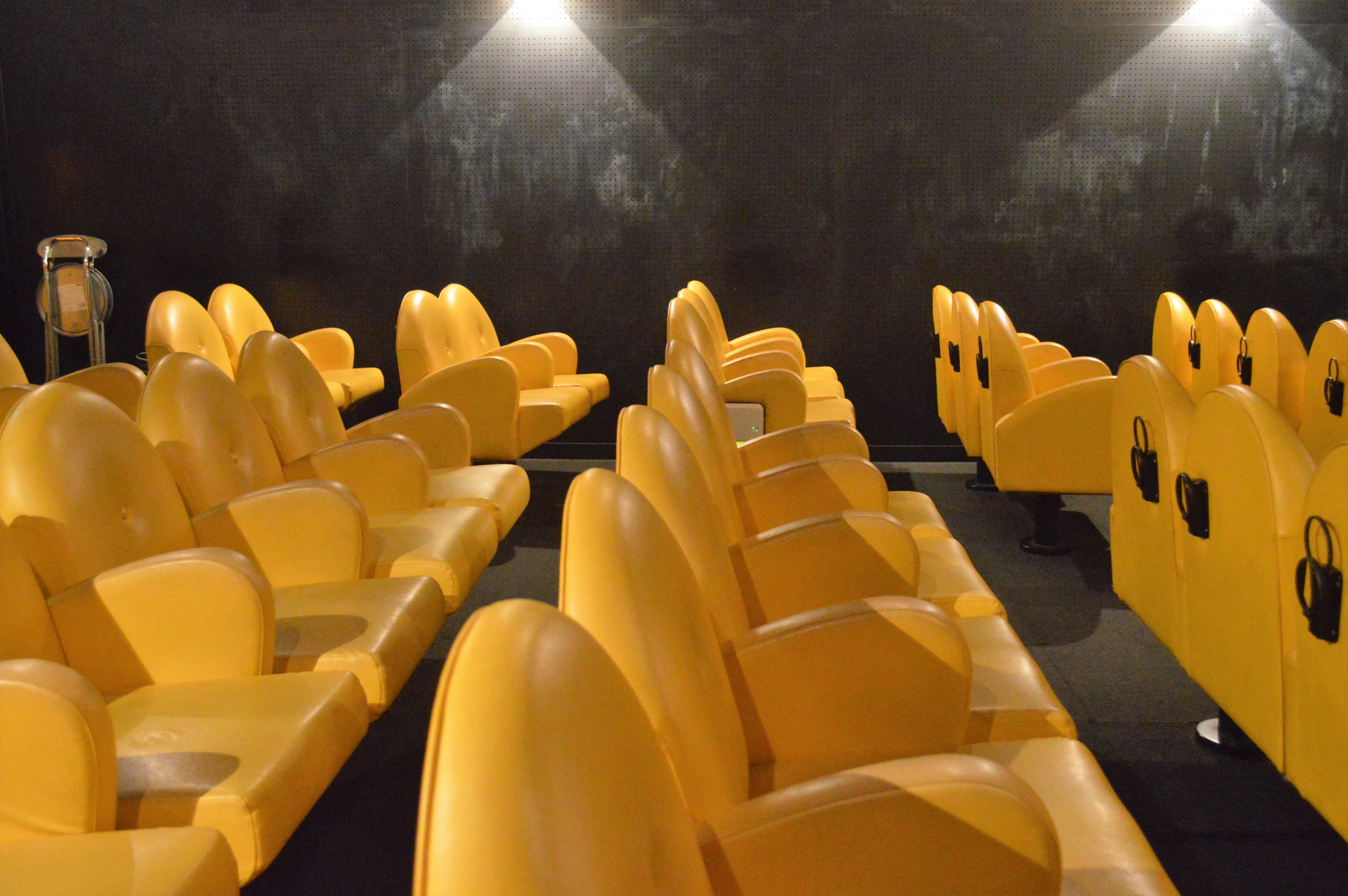 東京都世田谷区代沢にある映画館「下北沢トリウッド」。